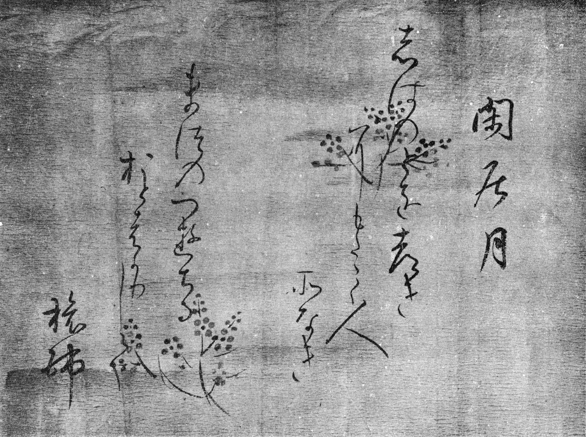 大口鯛ニ 筆 懐紙